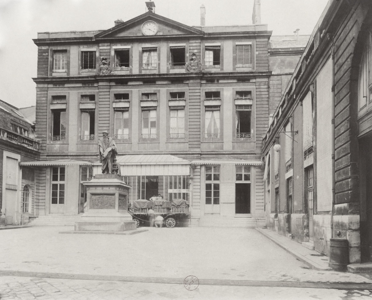 Hôtel de Rohan, Paris, entrée au 87, rue Vieille-du Temple (4e arr.). Depuis 1928, lieu de conservation et de consultation des archives du minutier central des notaires de Paris (archives nationales).